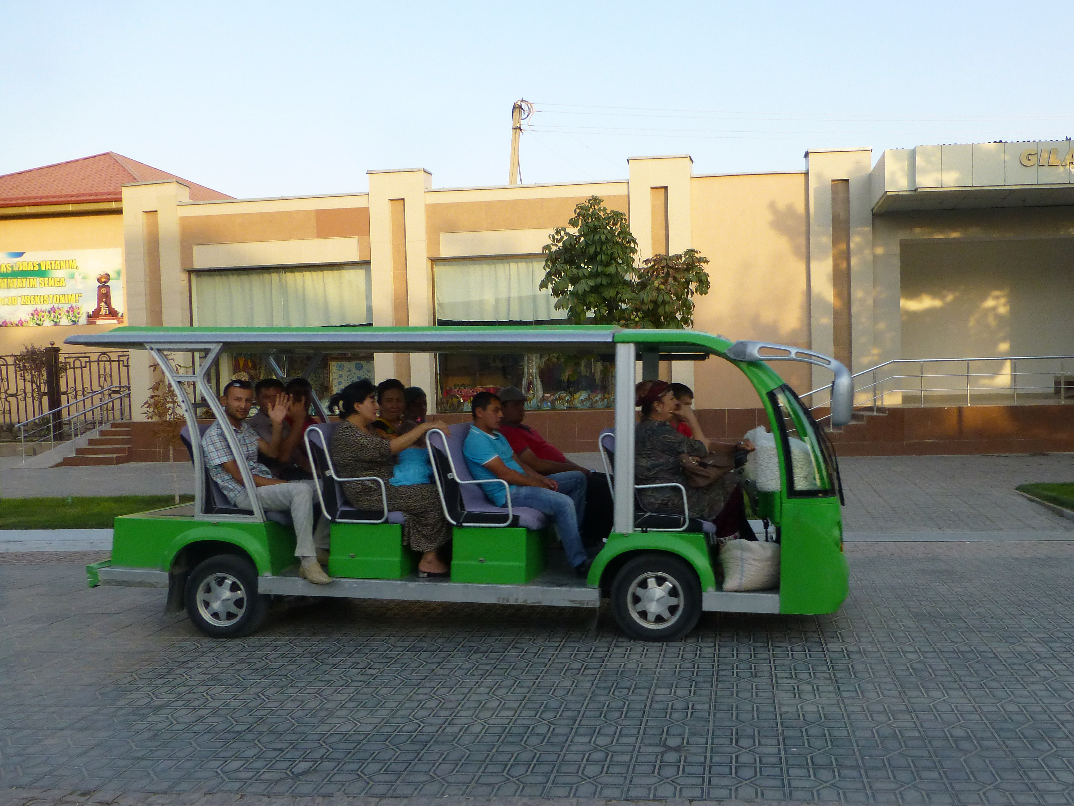 Bus électrique à Samarcande (Ouzbékistan)